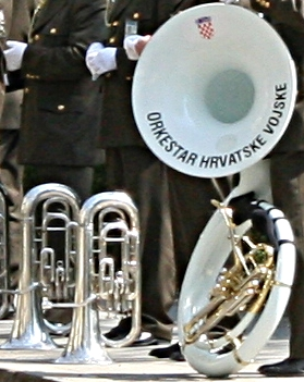 Svečanost podizanja NATO-ve zastave ispred zgrade MORH-a u Zagrebu.